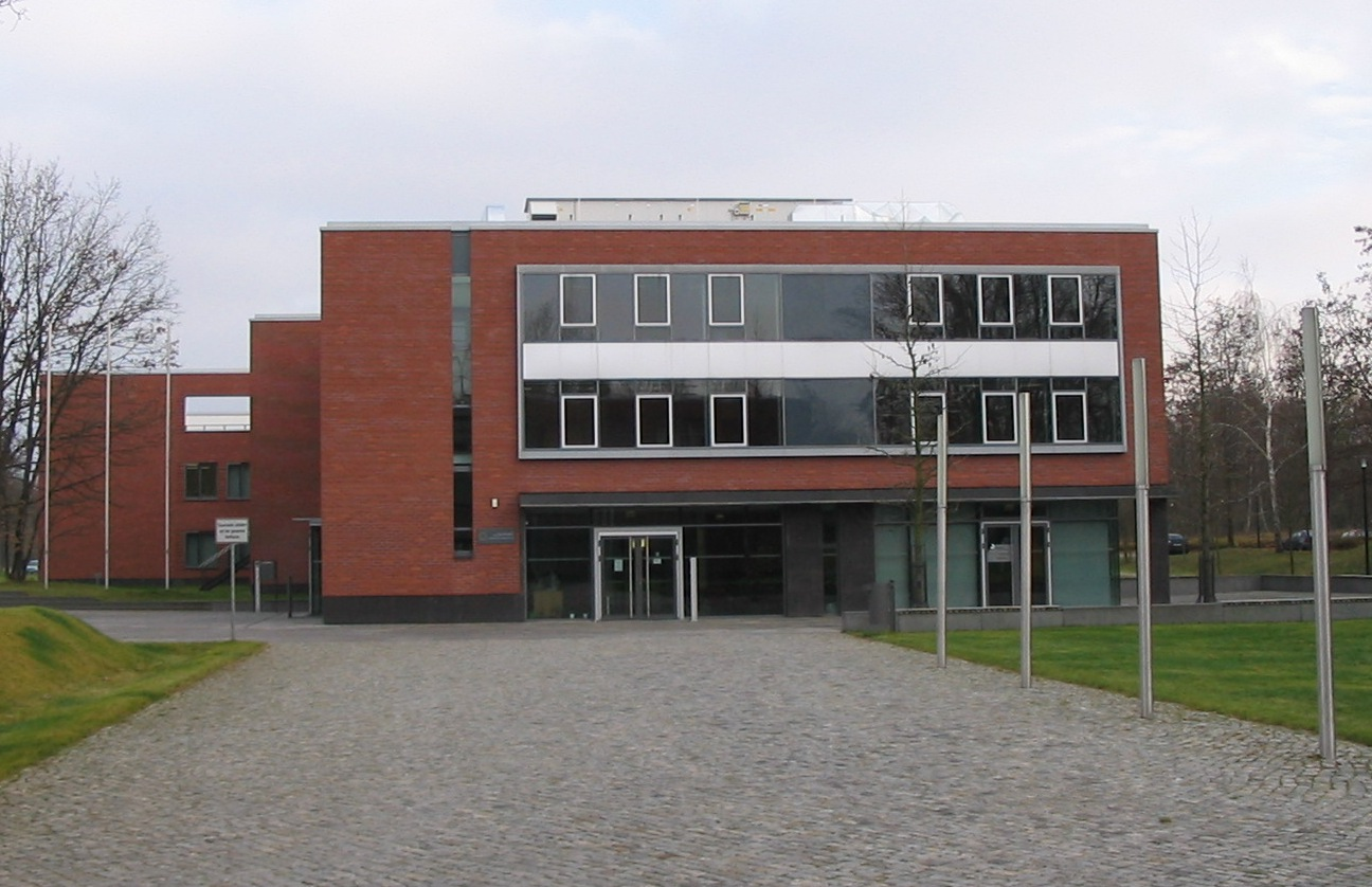 Institutsgebäude des Hasso-Plattner-Instituts in Potsdam.